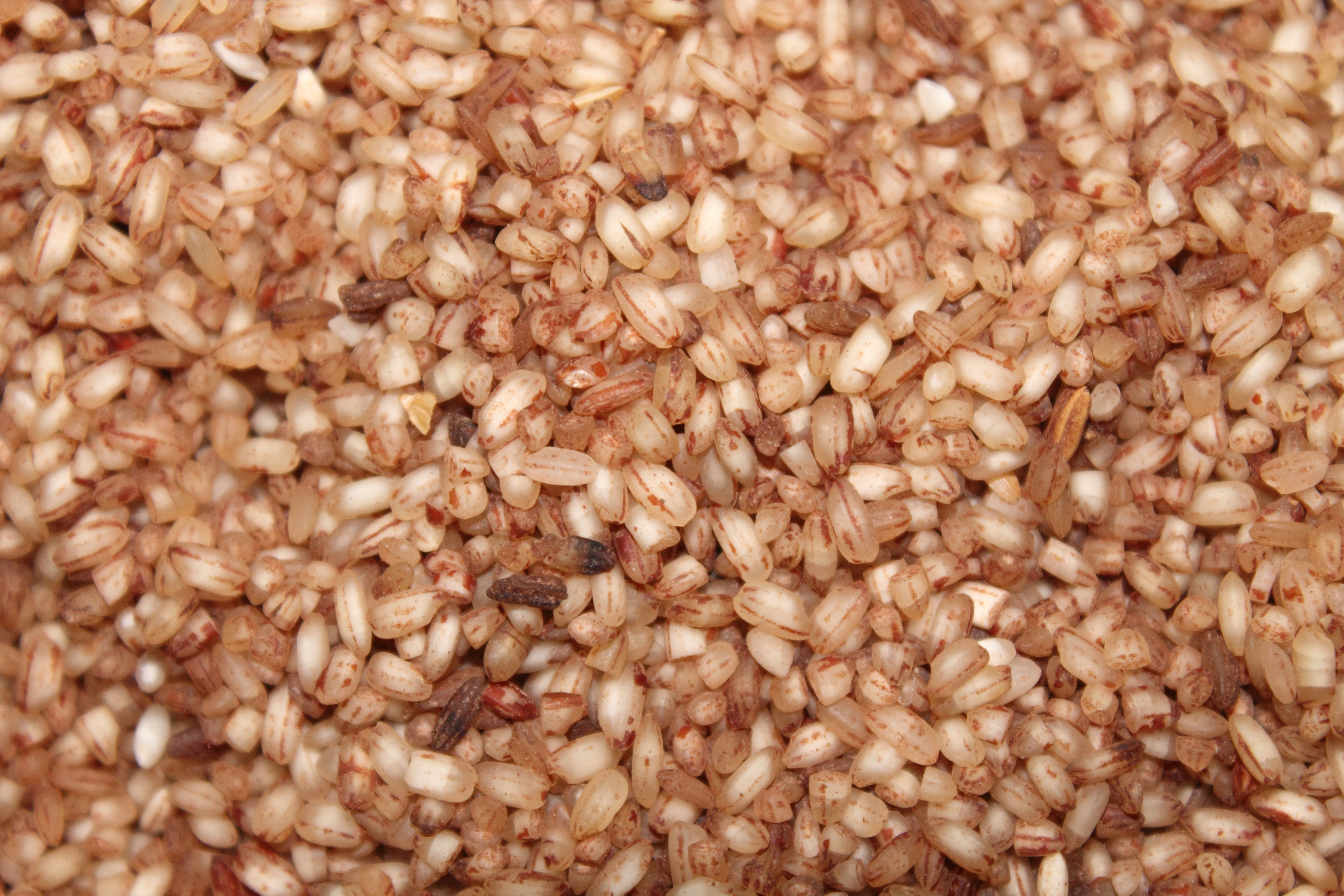 കേരളത്തിലേ തനതു അരികൾ